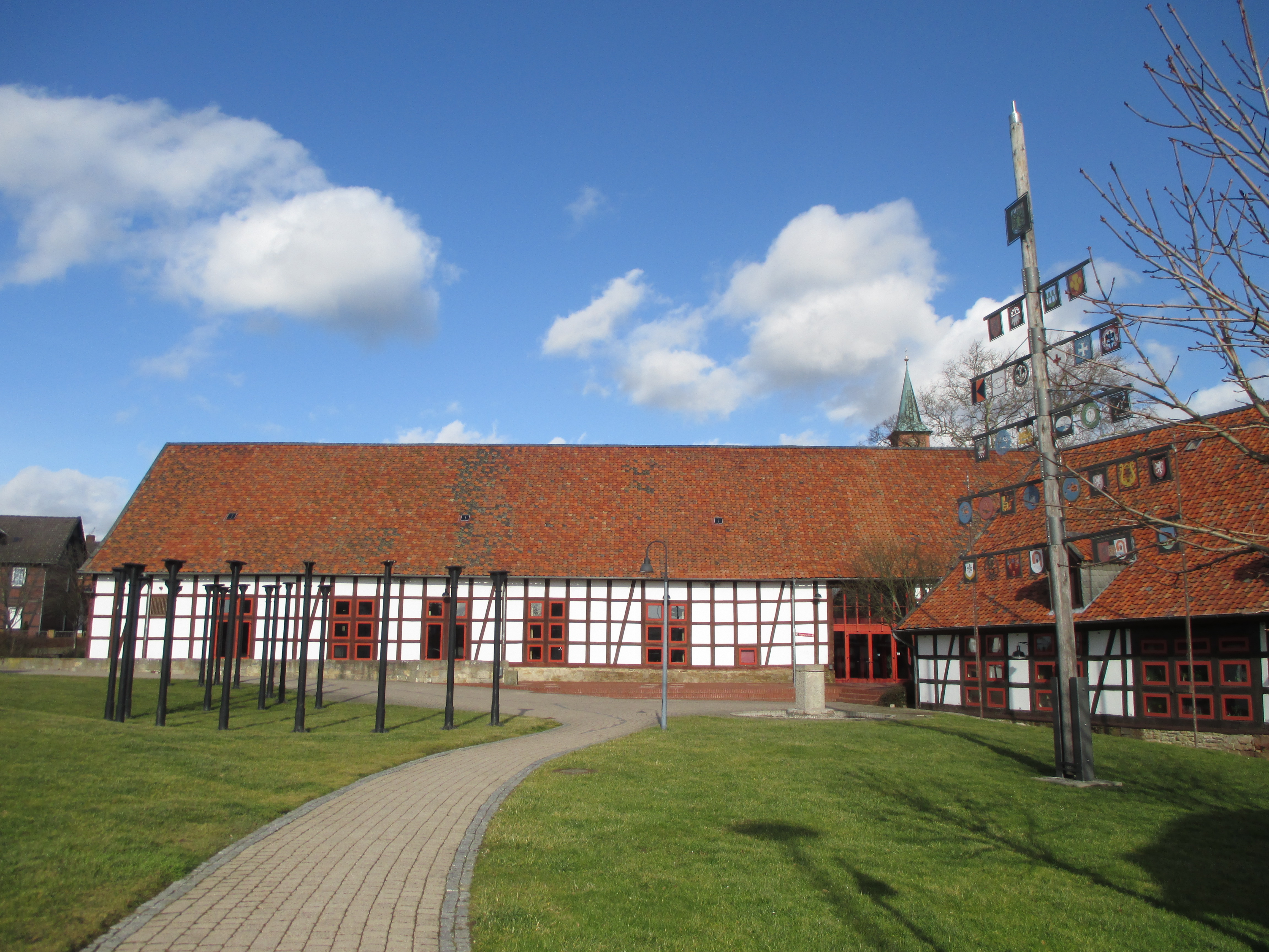 Gemeindeverwaltung Schladen-Werla im Ortsteil Schladen, Landkreis Wolfenbüttel